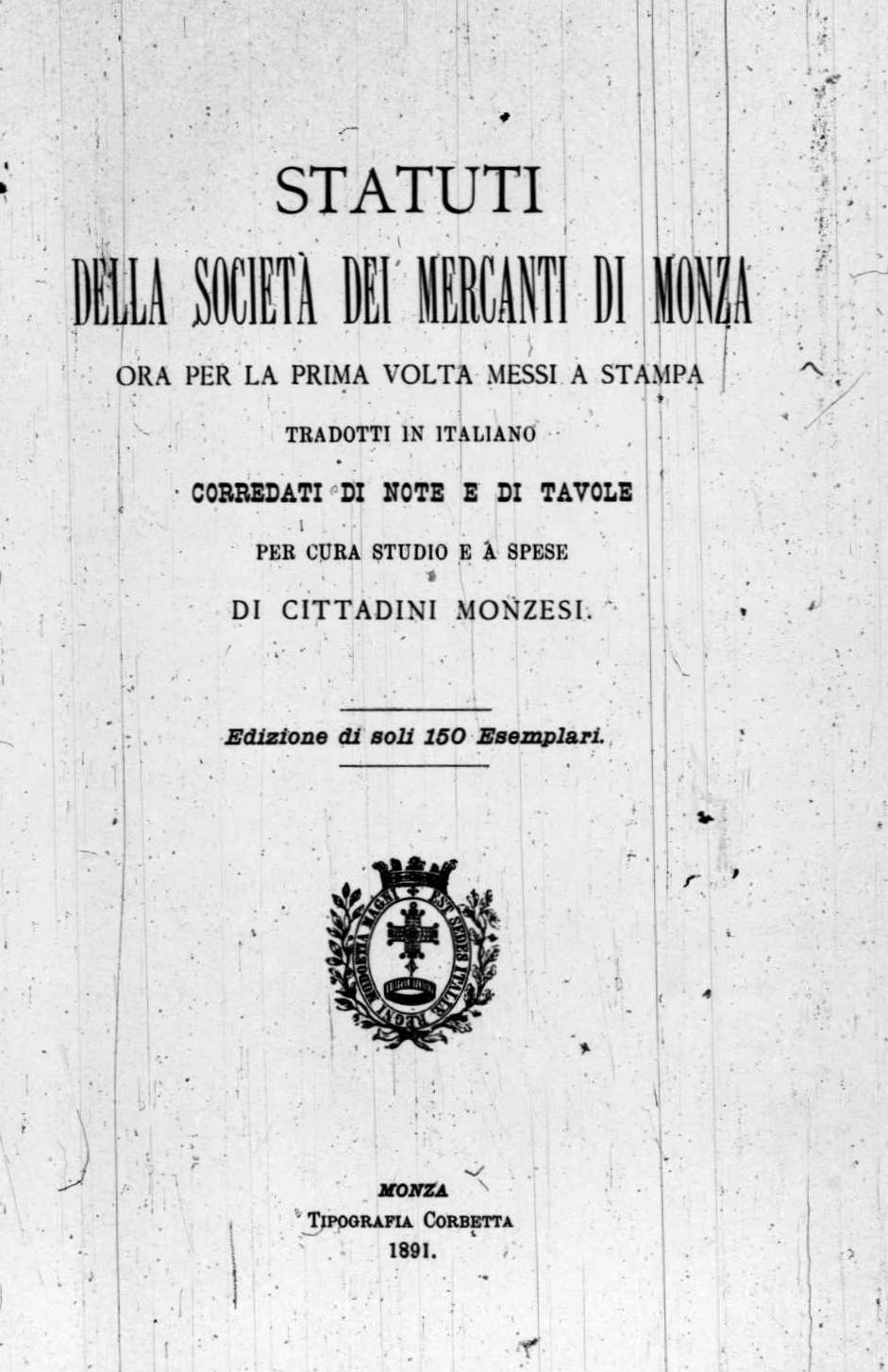 Frontespizio